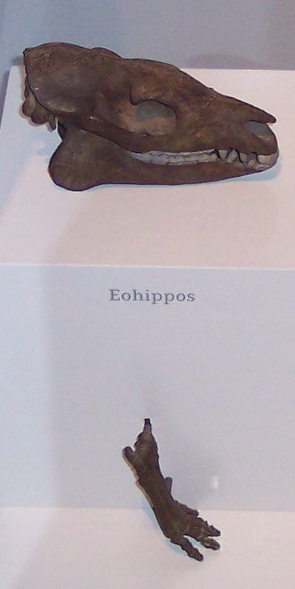 Hyracotherium Schädel Lauf